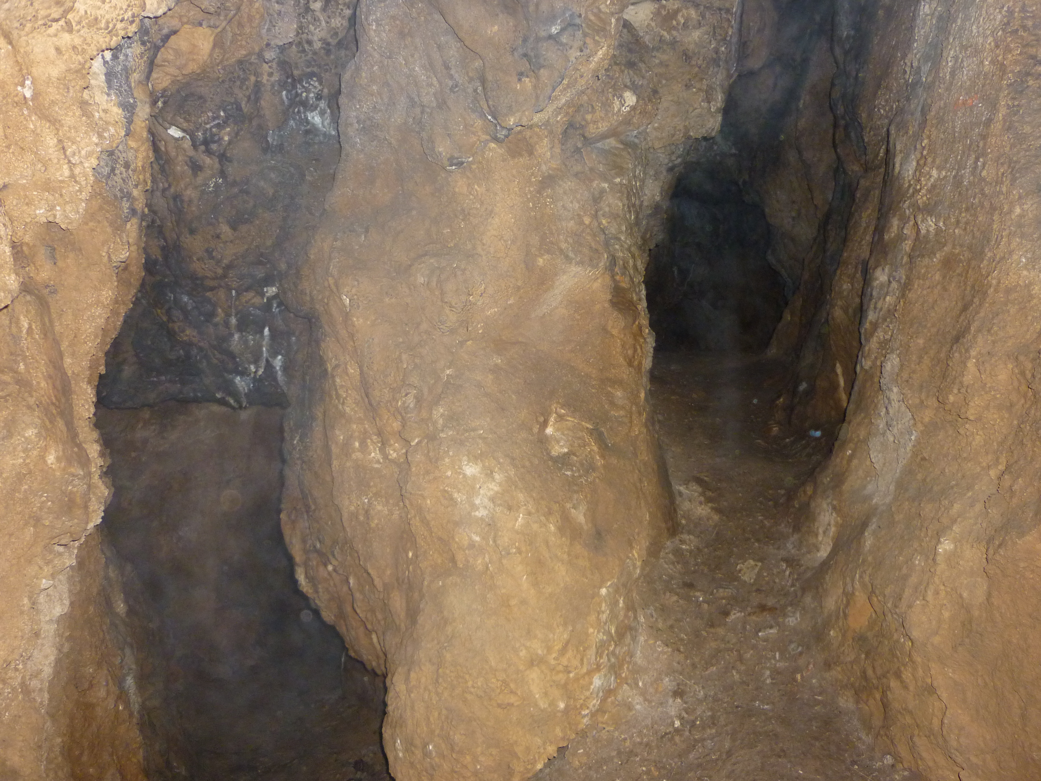 Hier spaltet sich die Wandererklamm in den Rathstollen (links) und den Rohrauerdomgang (rechts). Langes Loch, Flatzer Wand, Niederösterreich.